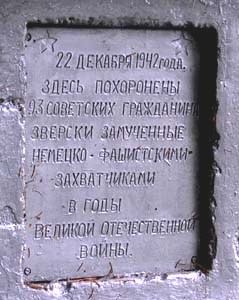 Надпись на памятнике убитым евреям - узникам гетто в Лынтупах.